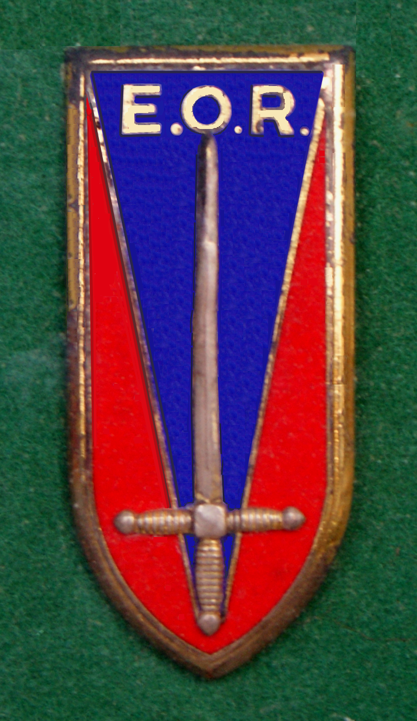 Insigne du bataillon EOR de l'ESM de Saint-Cyr en 1971